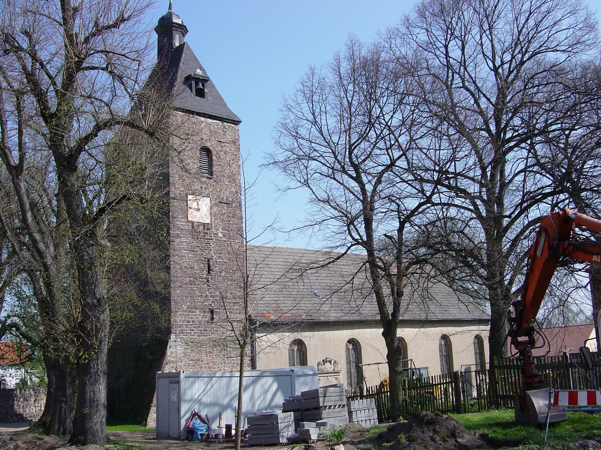 Evangelische Kirche St. Stephanus in Schnarsleben